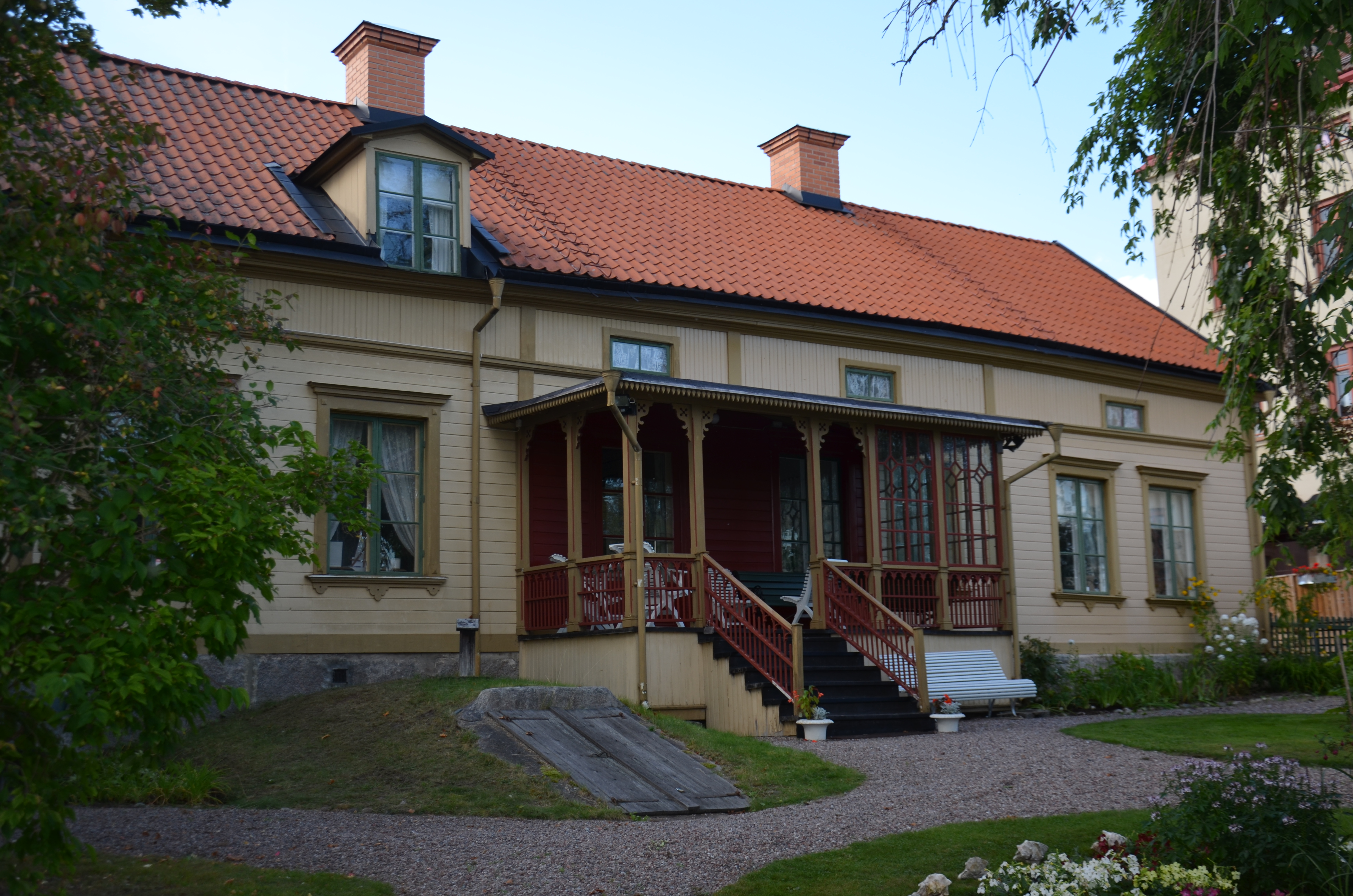 Göthlinska gården i Nora kommun,Örebro län